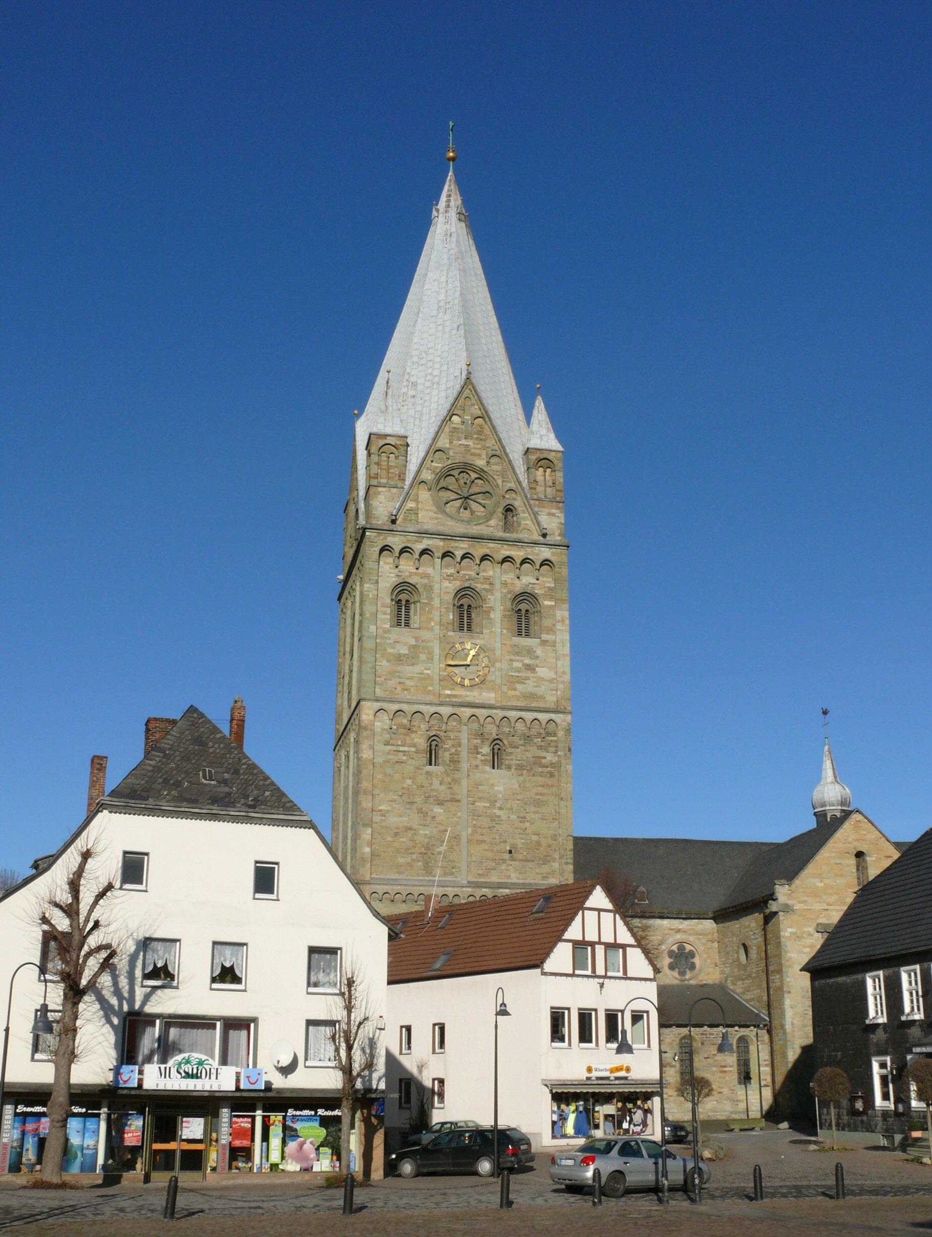 St. Laurentiuskirche